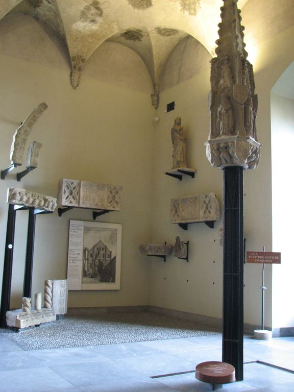 Castello Sforzesco - Sala IV